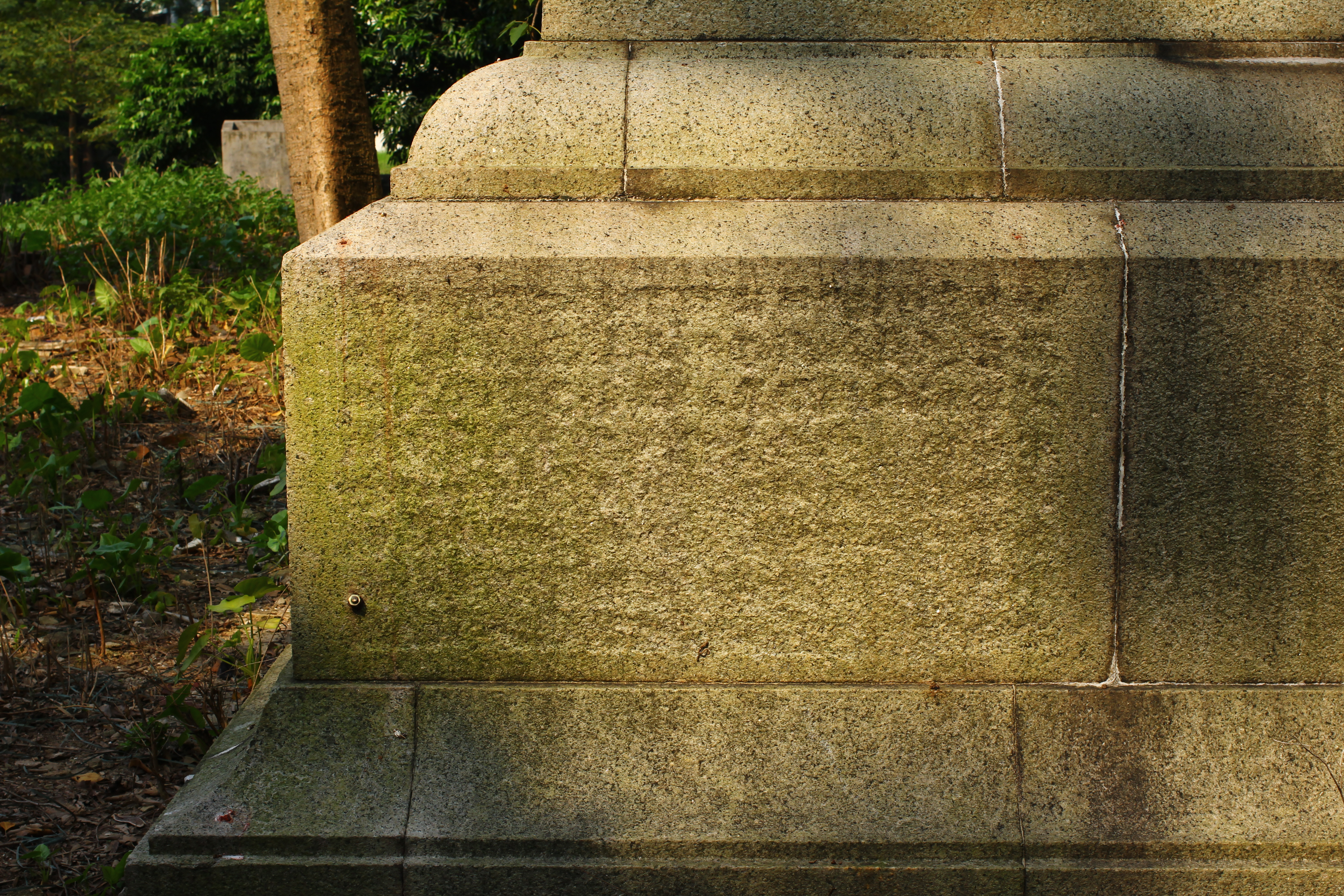 粵軍第一師諸先烈紀念碑基座左側在文化大革命時被鑿除的碑文。